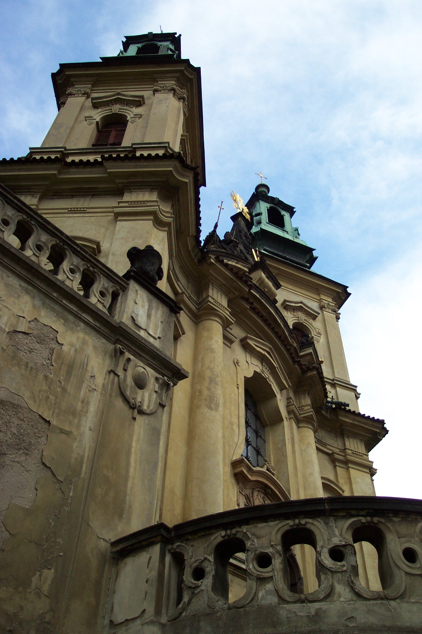 Kostel svatého Jana na skalce na pražském Novém městě - The Church of Saint John at the Rock in Prague, New Town